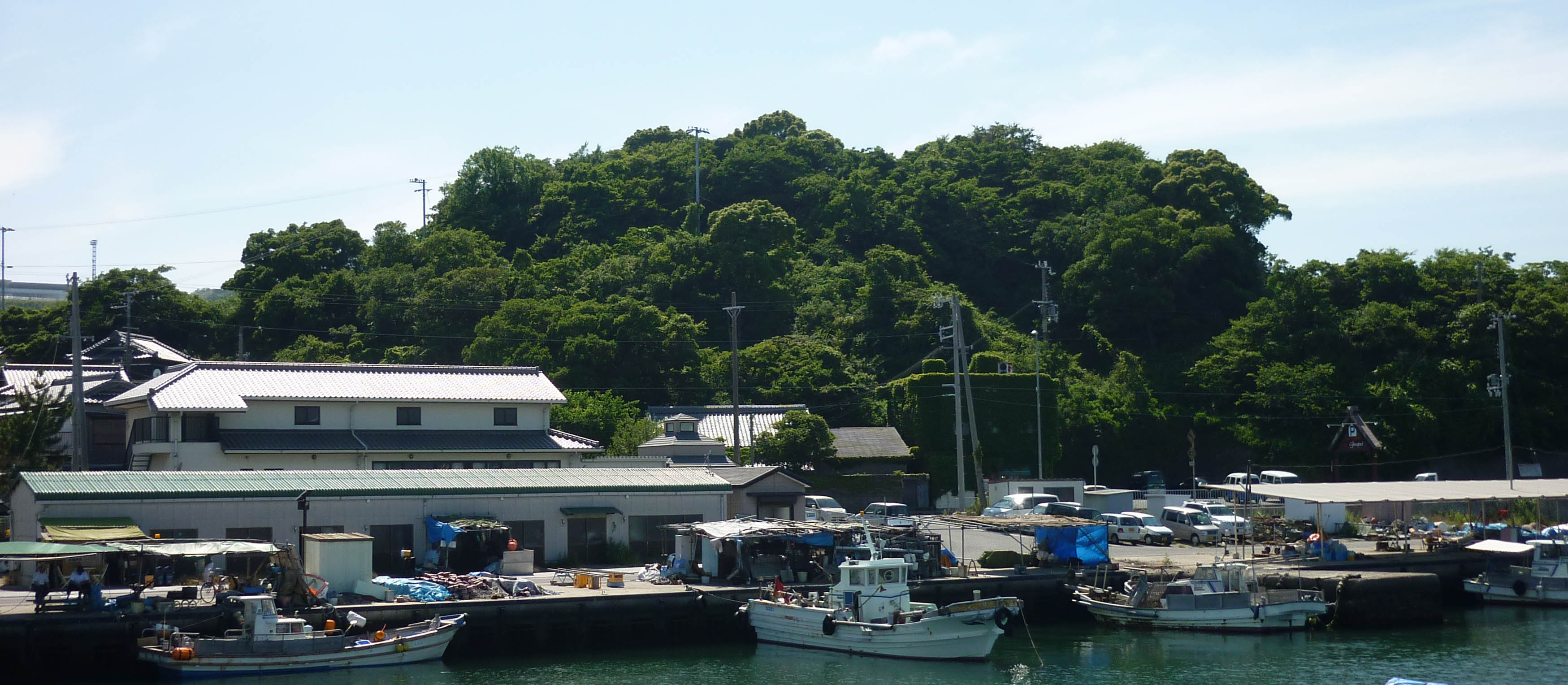 岩屋城の城山